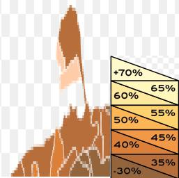 Poblacion Blanca en Falcon